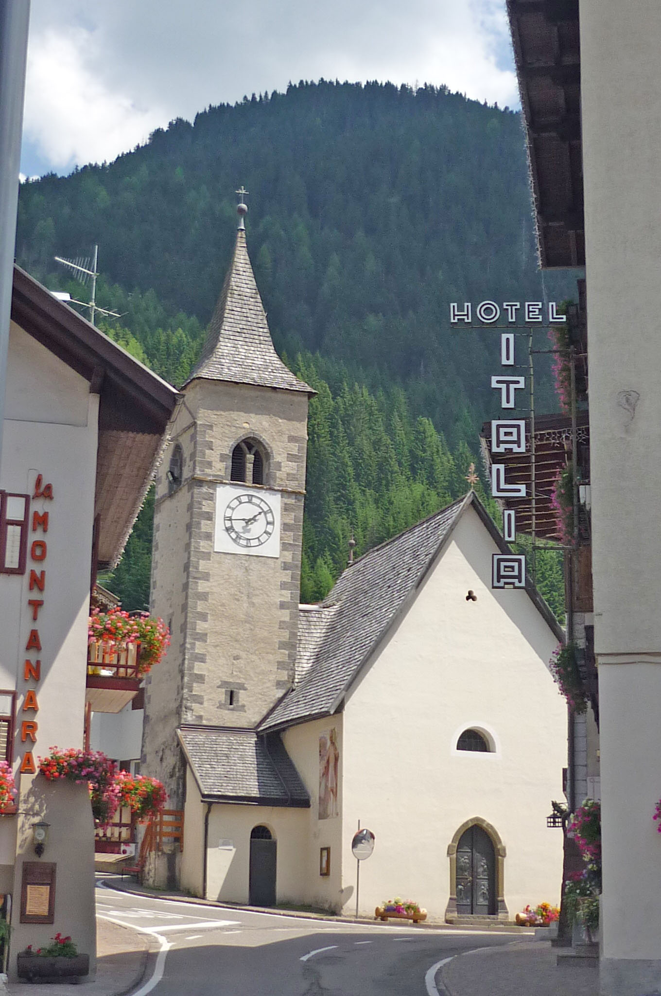 Pfarrkirche in Canazei/Trentino